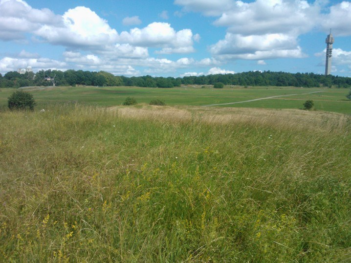 Ladugårdsgärde. I bakgrunden Kaknästornet.